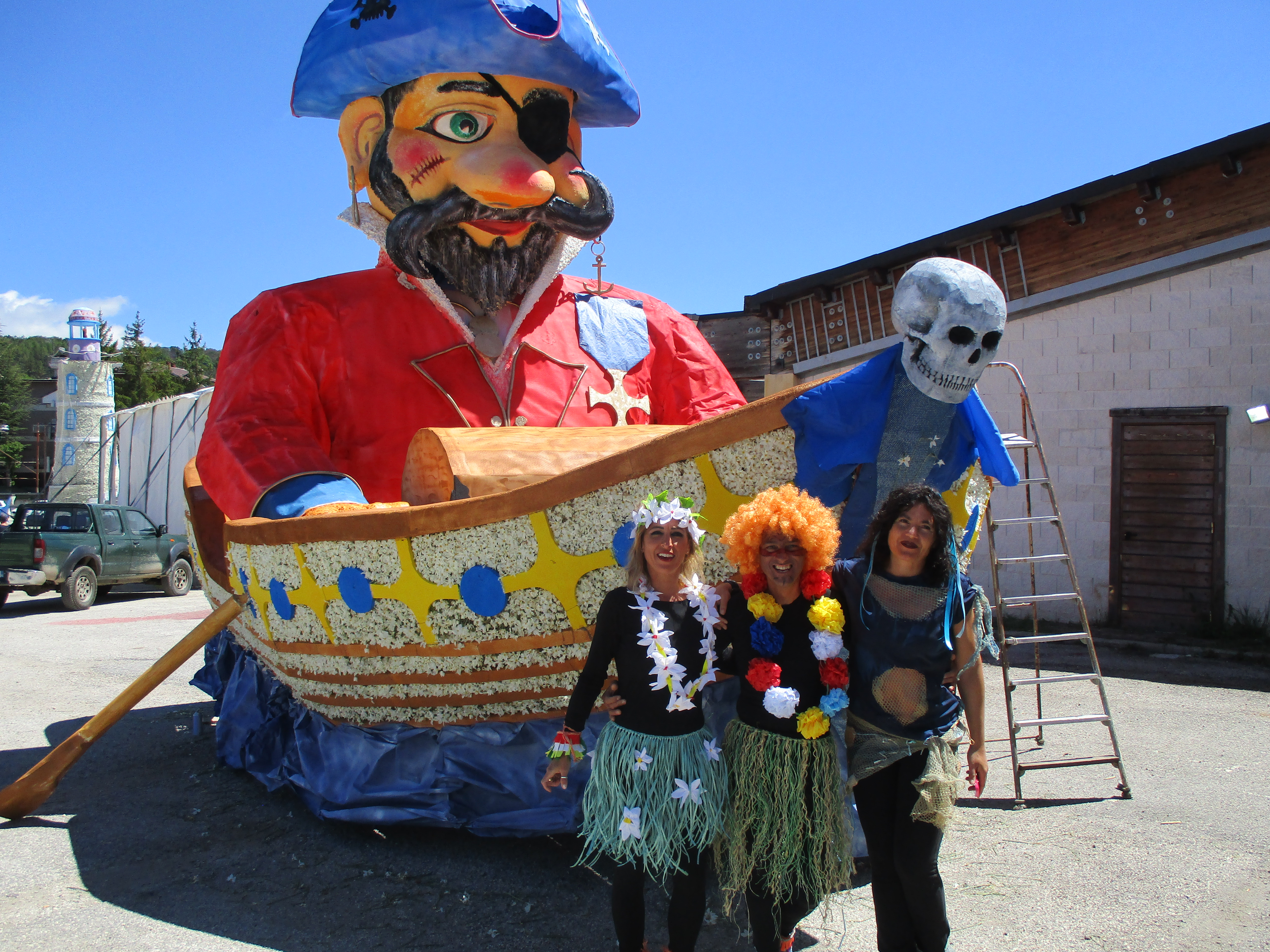 Carro e maschere durante la festa del Narciso